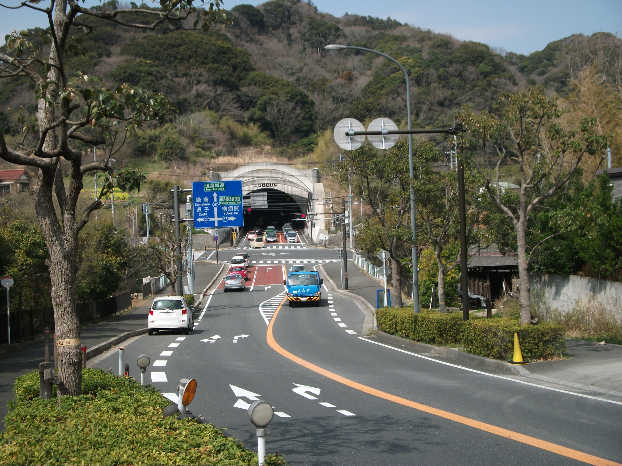 三浦半島中央道路、湘南国際村交差点付近。奥が逗子方面。